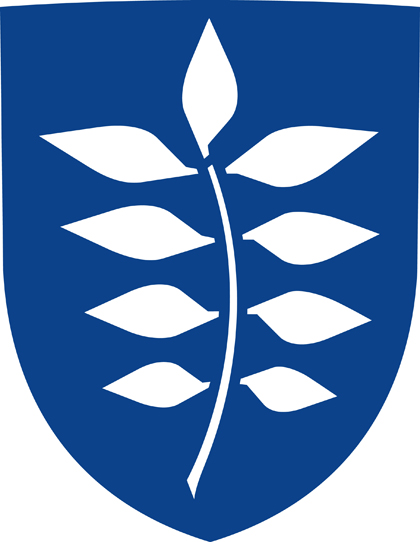 Shield of Rudersdal Municipality (2007)